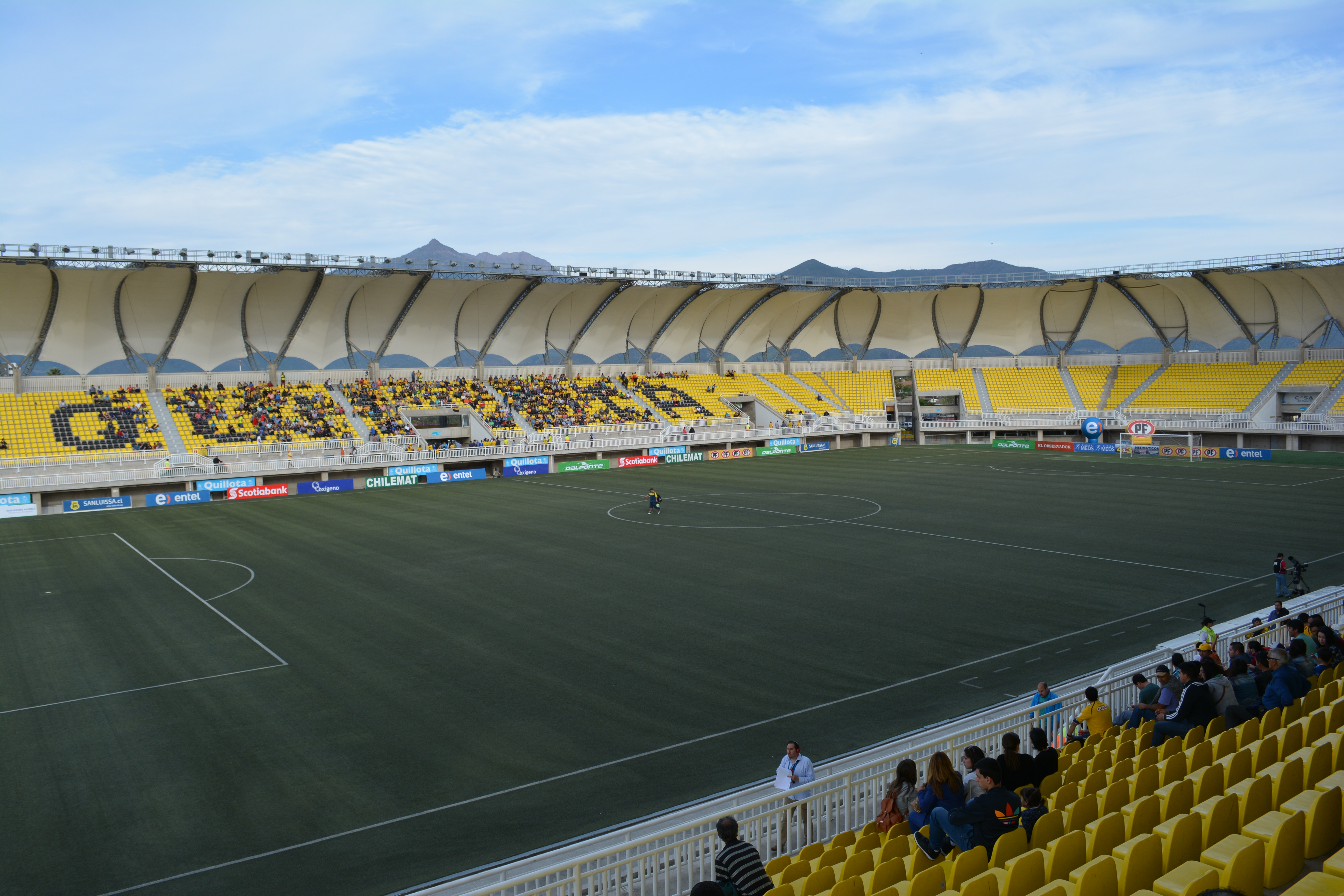 San Luis - Unión Española, 13-09-2015, Estadio Municipal Lucio Fariña Fernández, Quillota, Chile